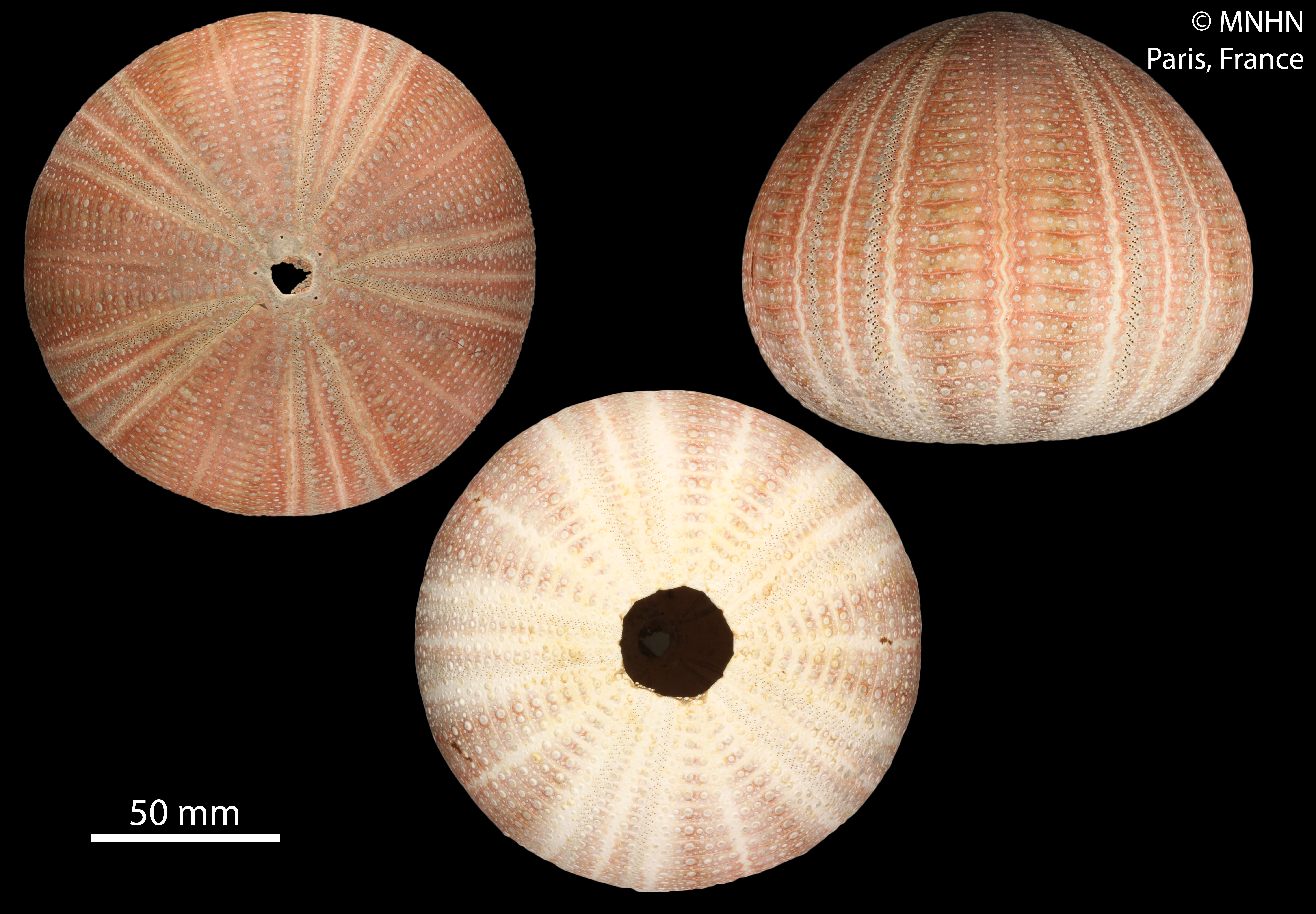 Echinus melo, collection du Muséum National d'Histoire Naturelle (Paris, France).